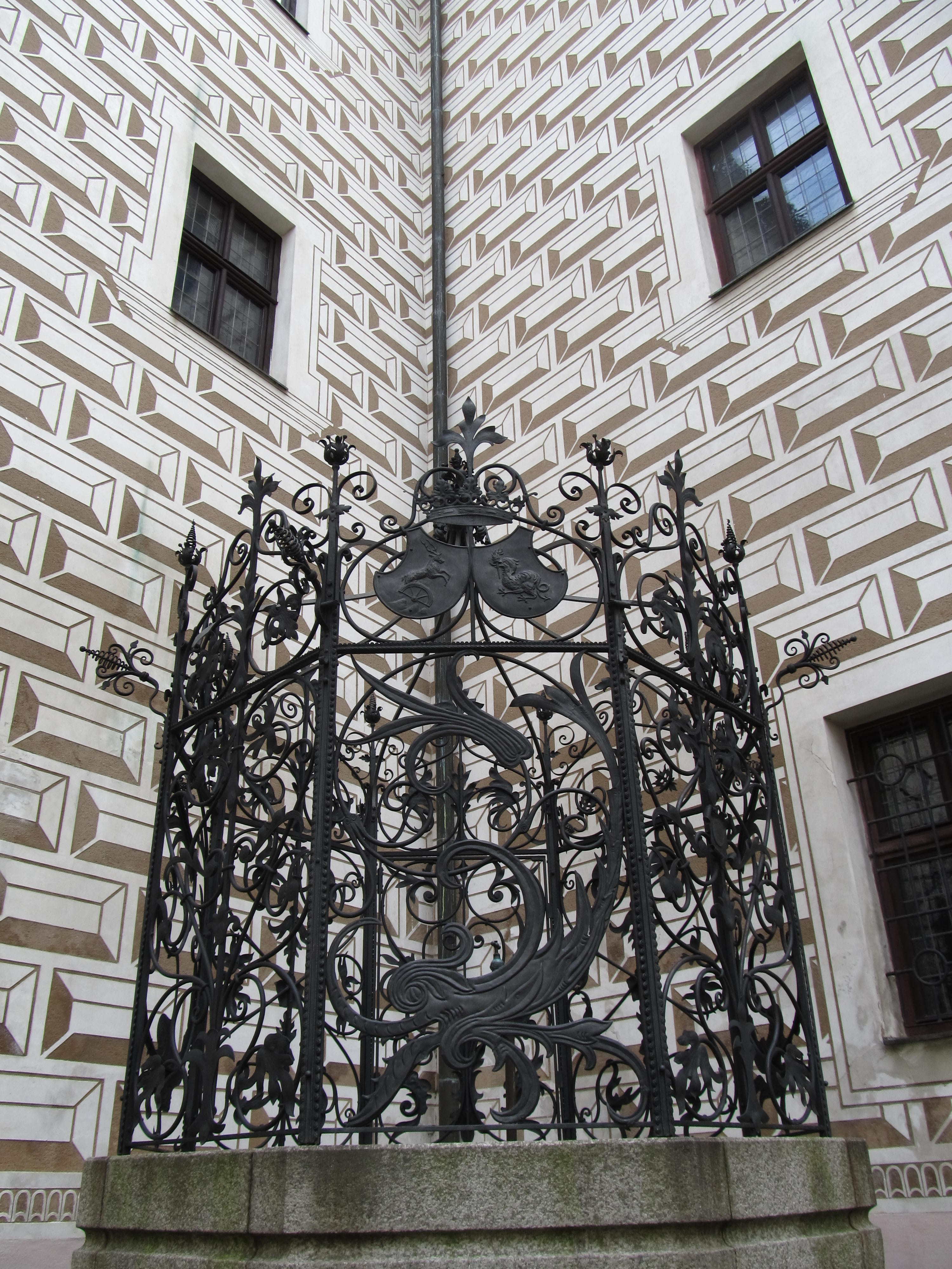 Studna na nádvoří z roku 1910